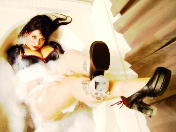 Elaina Satana